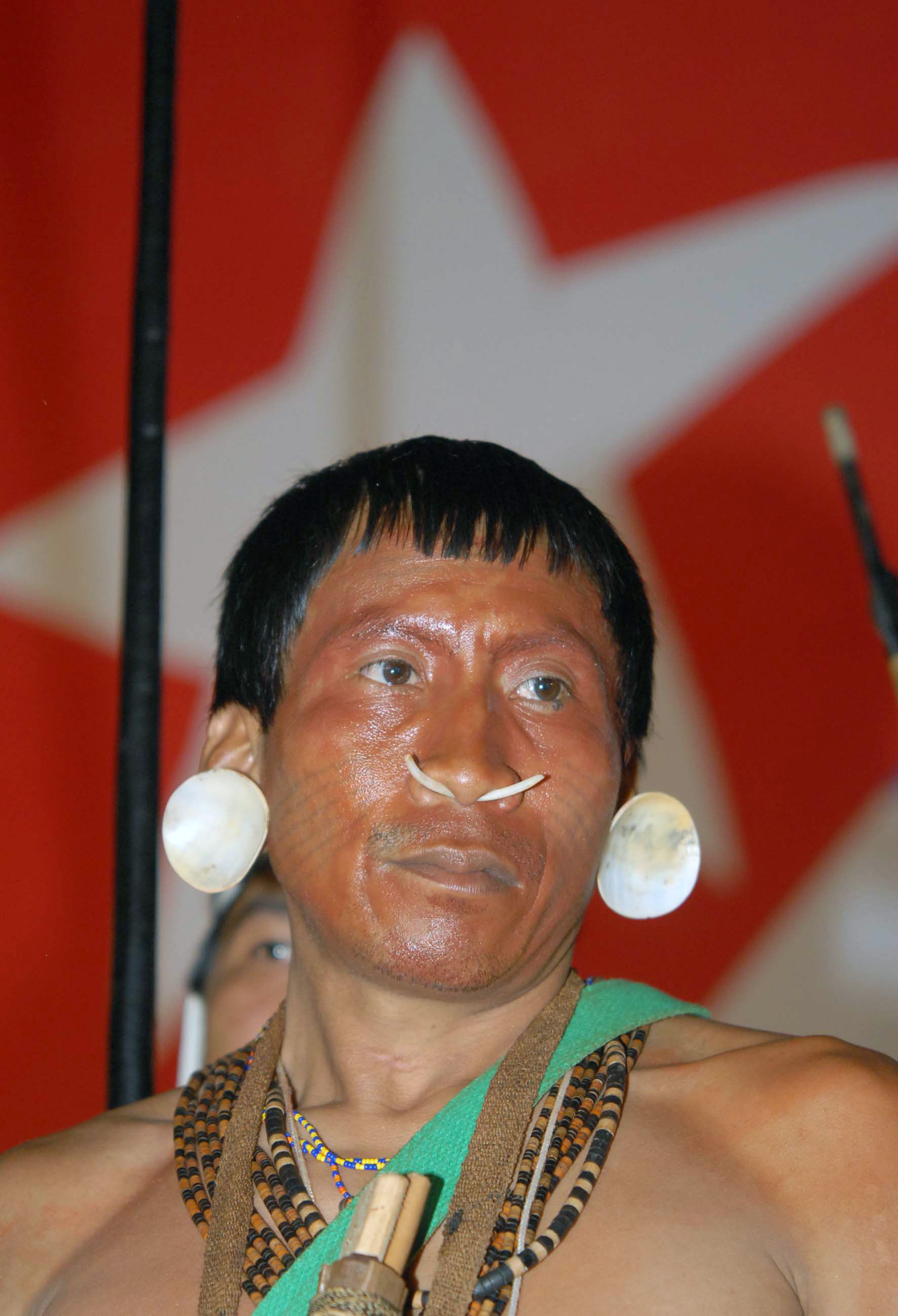 Belém - Indios de diversas etnias do Vale do Javarí fazem protesto e invadem a tenda Revolução Cubana e o Centro de Imprensa do FSM pedindo mais saúde e denunciando que vários de suas tribos morreram de hepatite nos últimos anos